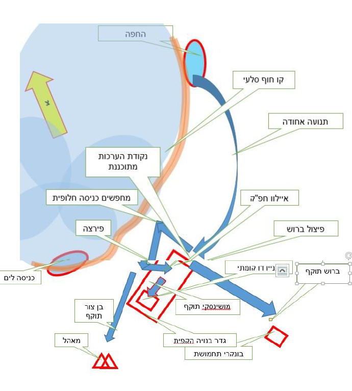 מרשם קרב מבצע מתח גבוה